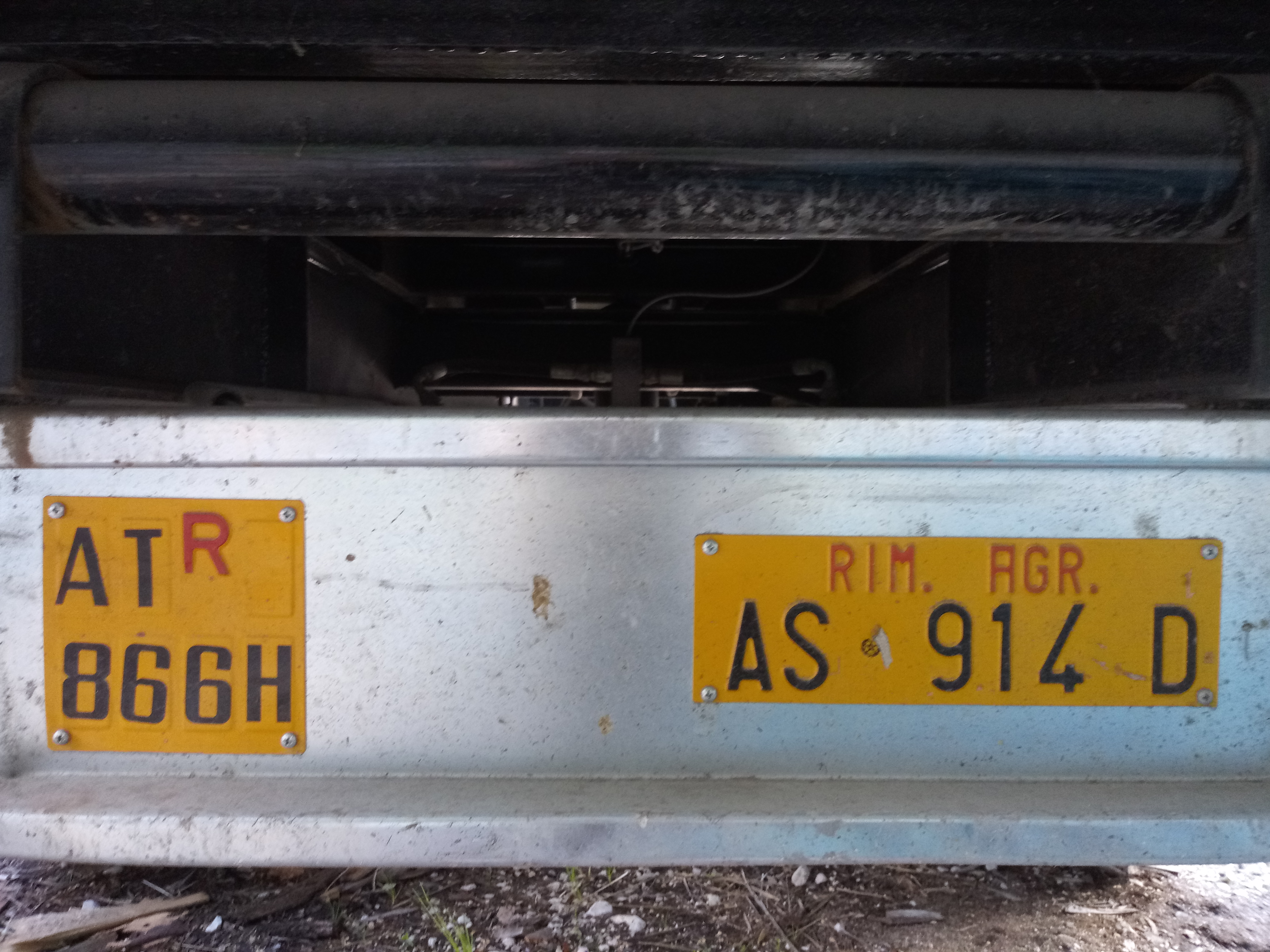 La foto rappresenta la targa di un rimorchio agricolo (a destra) accanto alla placca ripetitrice (con la "R" a sinistra) del veicolo trainante. Luogo: Zoreri (TN)